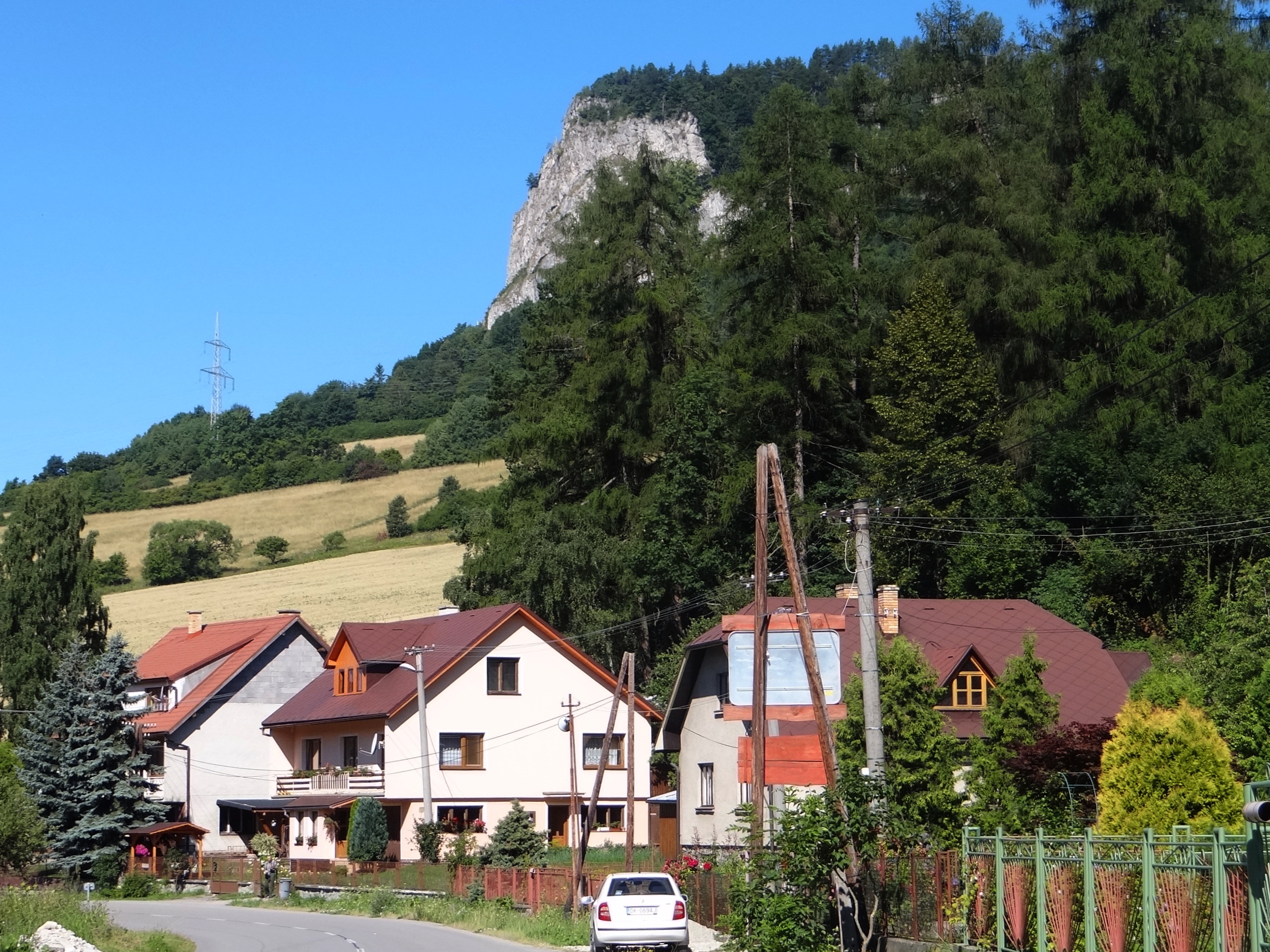 Leštiny i Ostra Skała